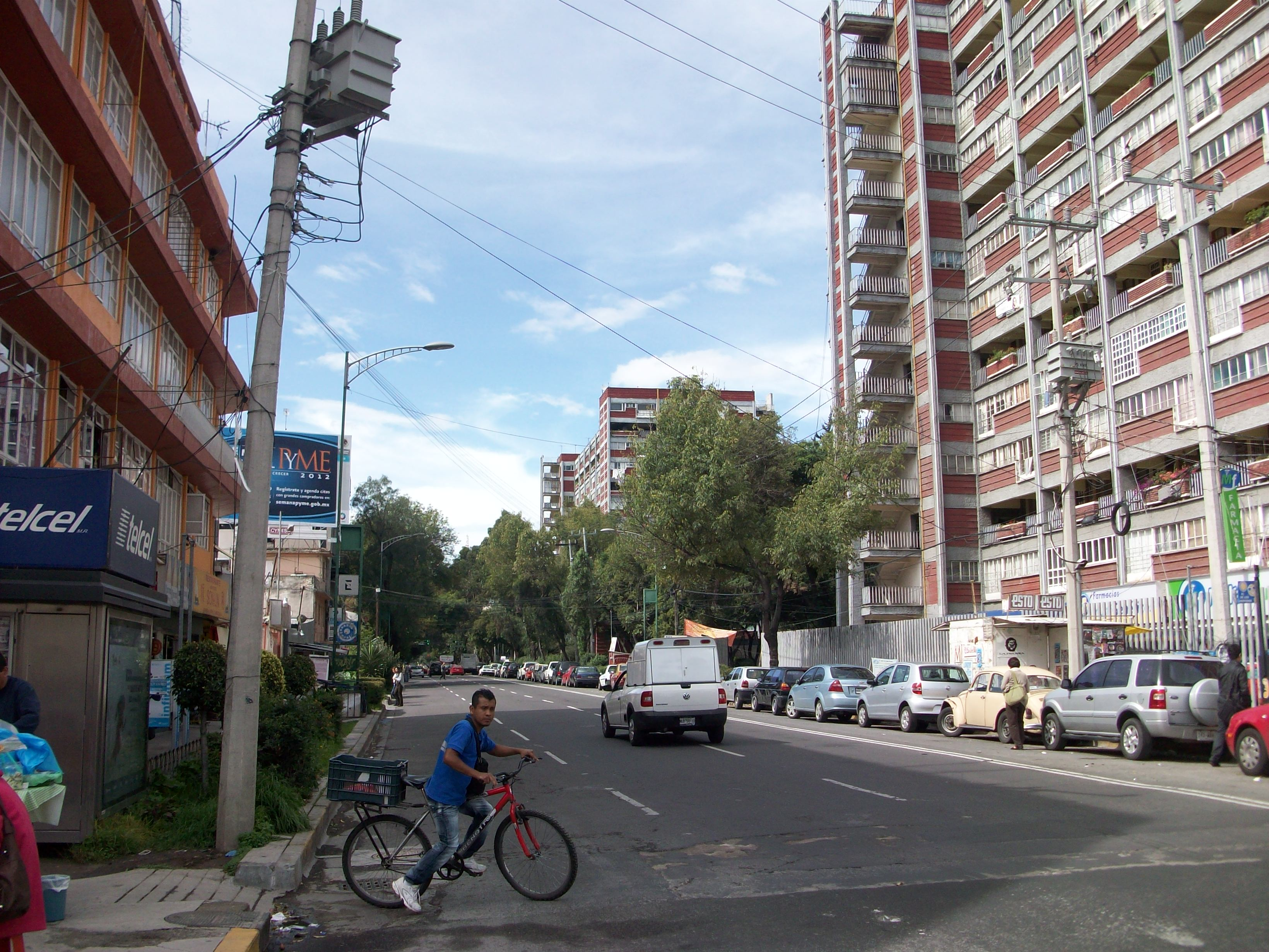 Avenida Coyoacan